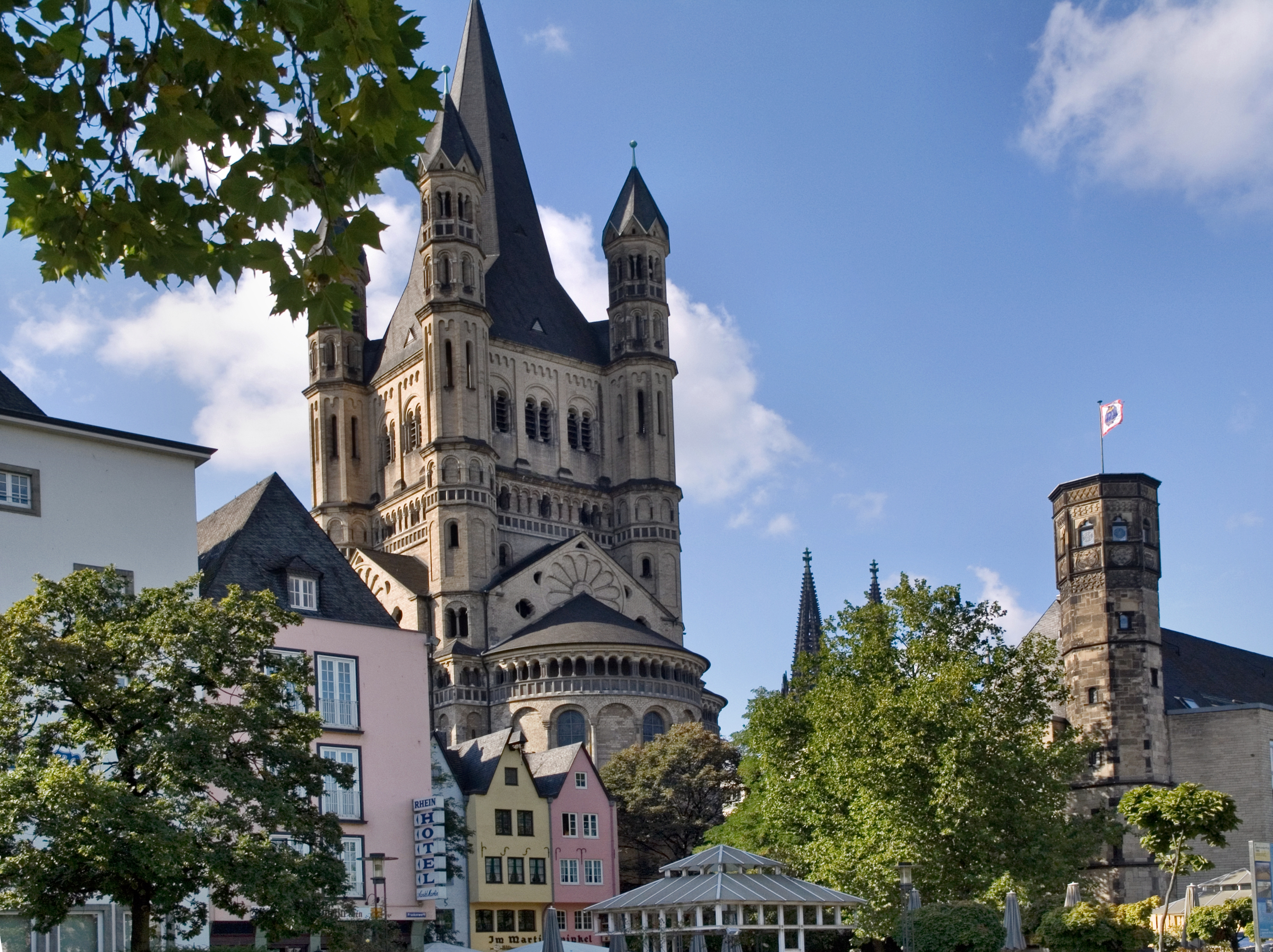 Северный Рейн-Вестфалия - Большой Святой Мартин